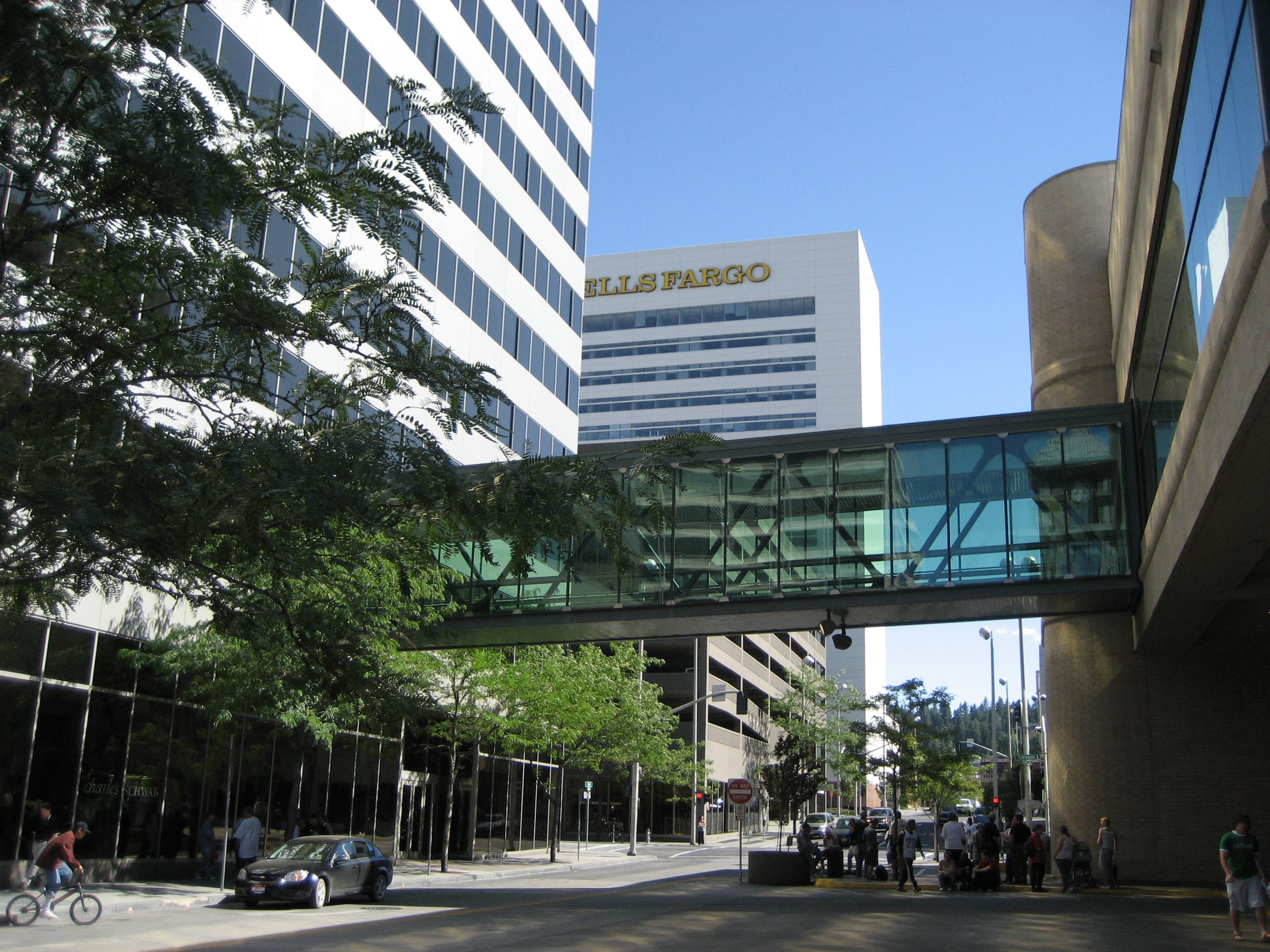 Spokane Sky Walks